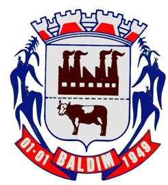 Brasão do município de Baldim, Estado de Minas Gerais, Brasil